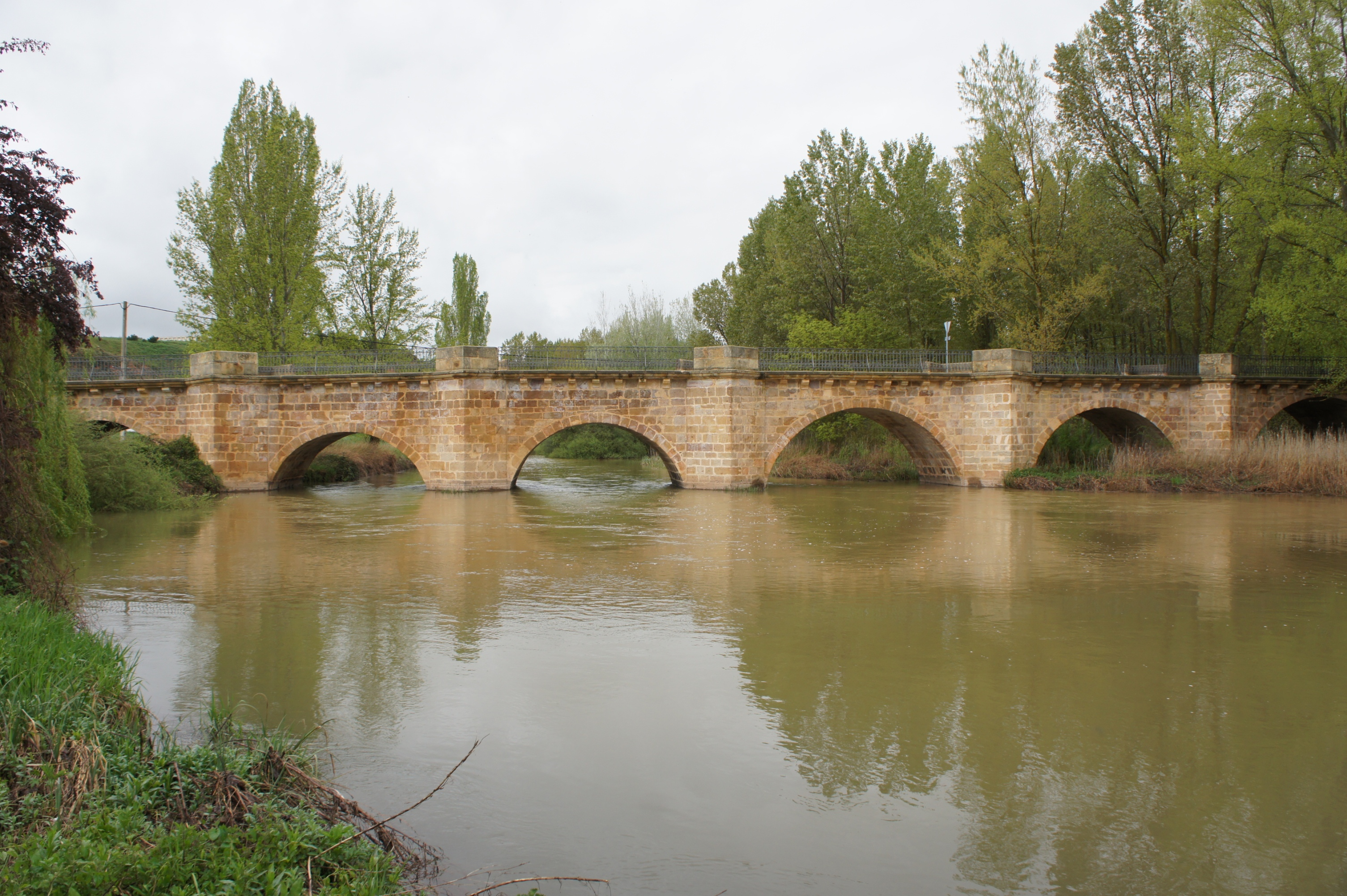 Puente de Herrera de Pisuerga